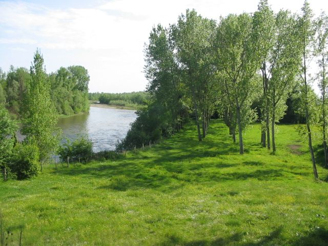 l'Allier à Limons (2008)